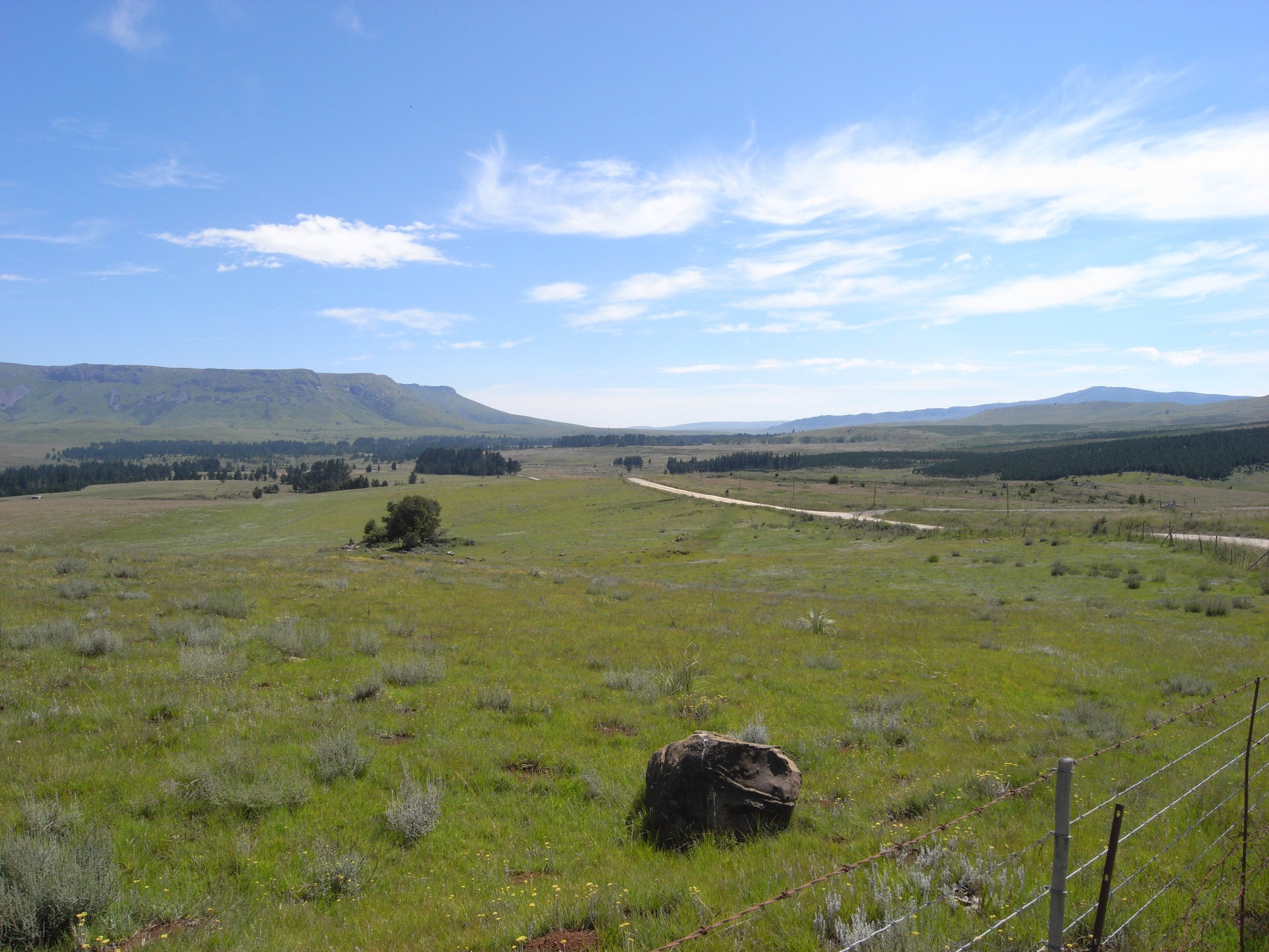 Elandsberg (links), Blick auf die südöstlichen Abhänge, in der Provinz Eastern Cape (Südafrika)